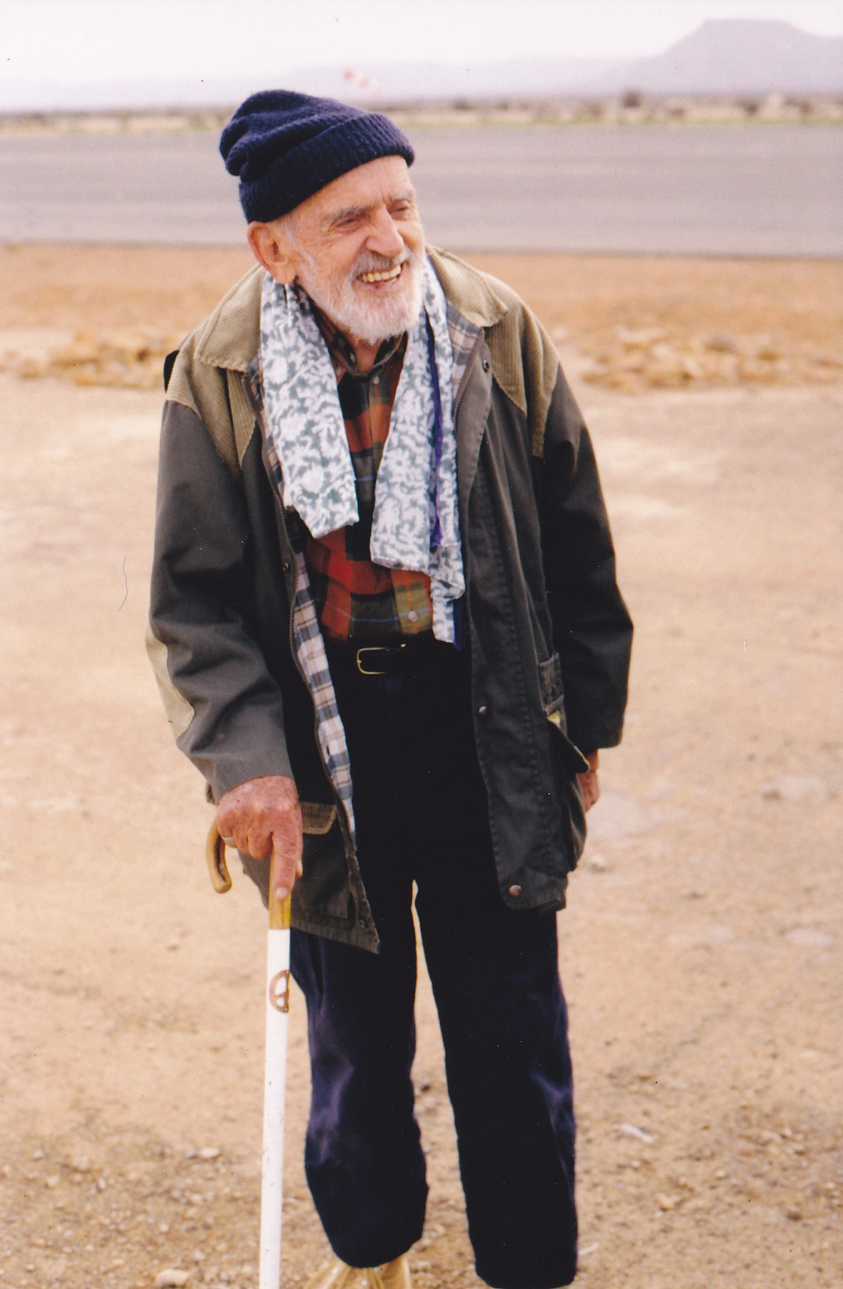 Photo prise sur l'aéroport d'Atar le 20 décembre 1998, dernier jour de son dernier voyage.